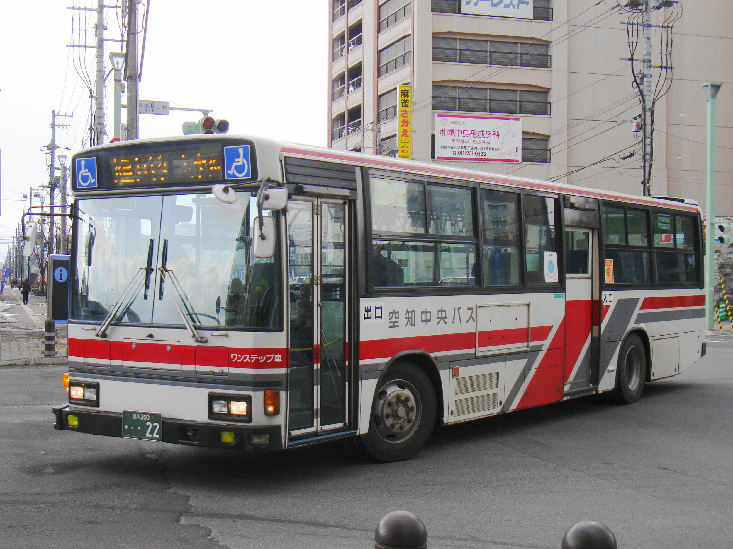 Fukagawa to Asahikawa